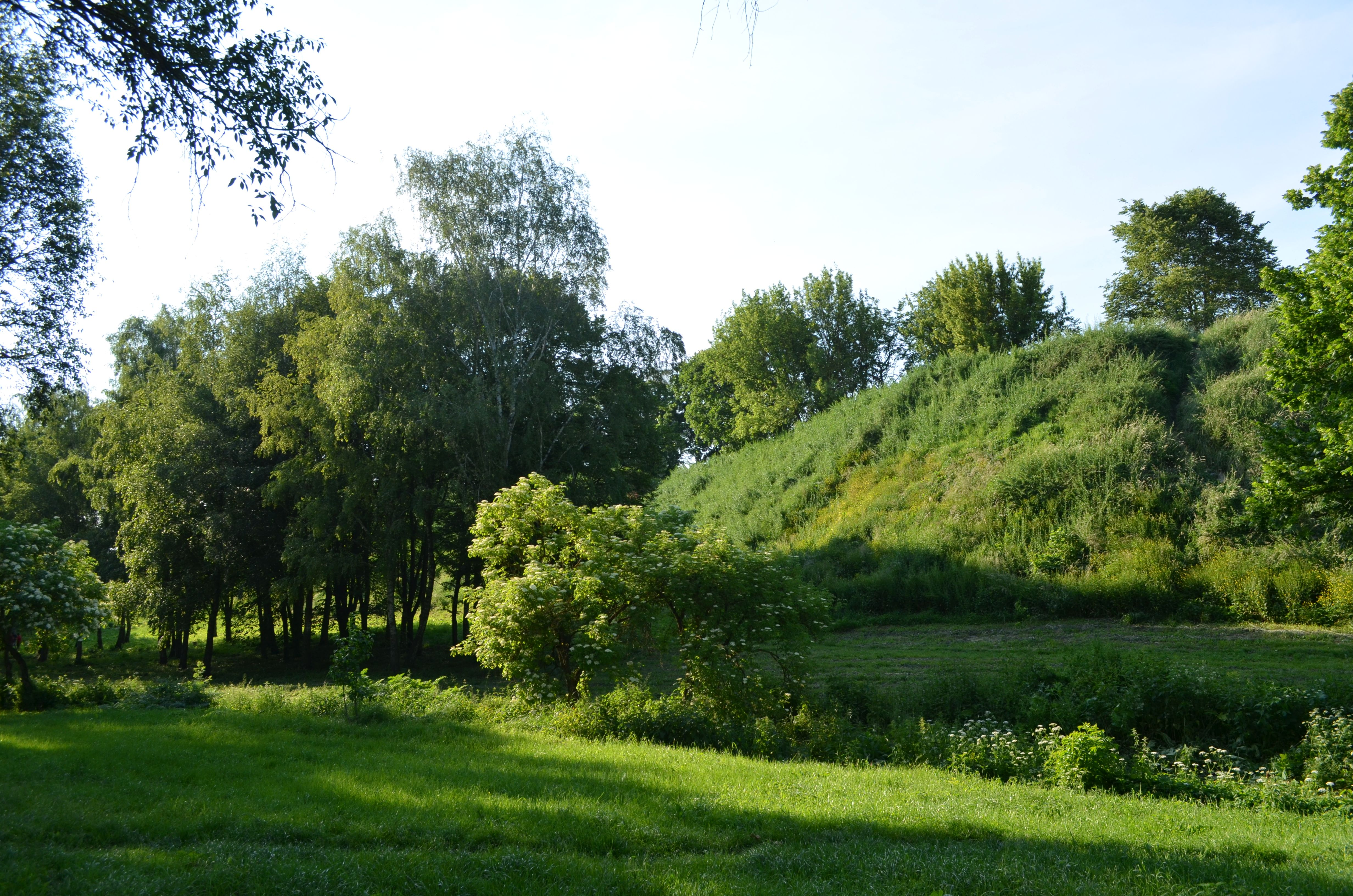 Земляні вали замку, Володимир-Волинський, вул. Підзамче